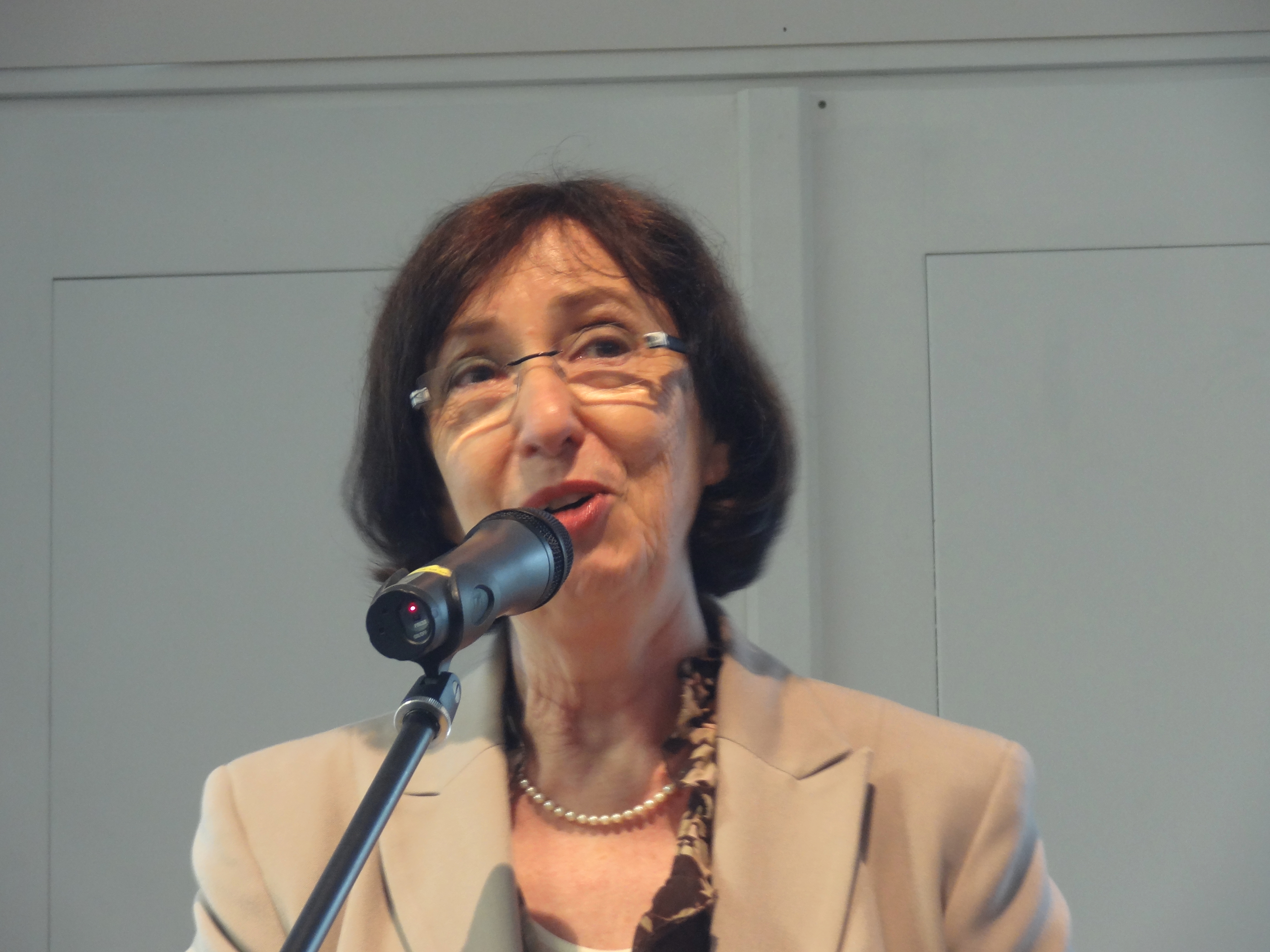 Dagmar Goch, Hattinger Bürgermeisterin; Ausstellungseröffnung Bettina Bülow-Böll, Stadtmuseum Hattingen